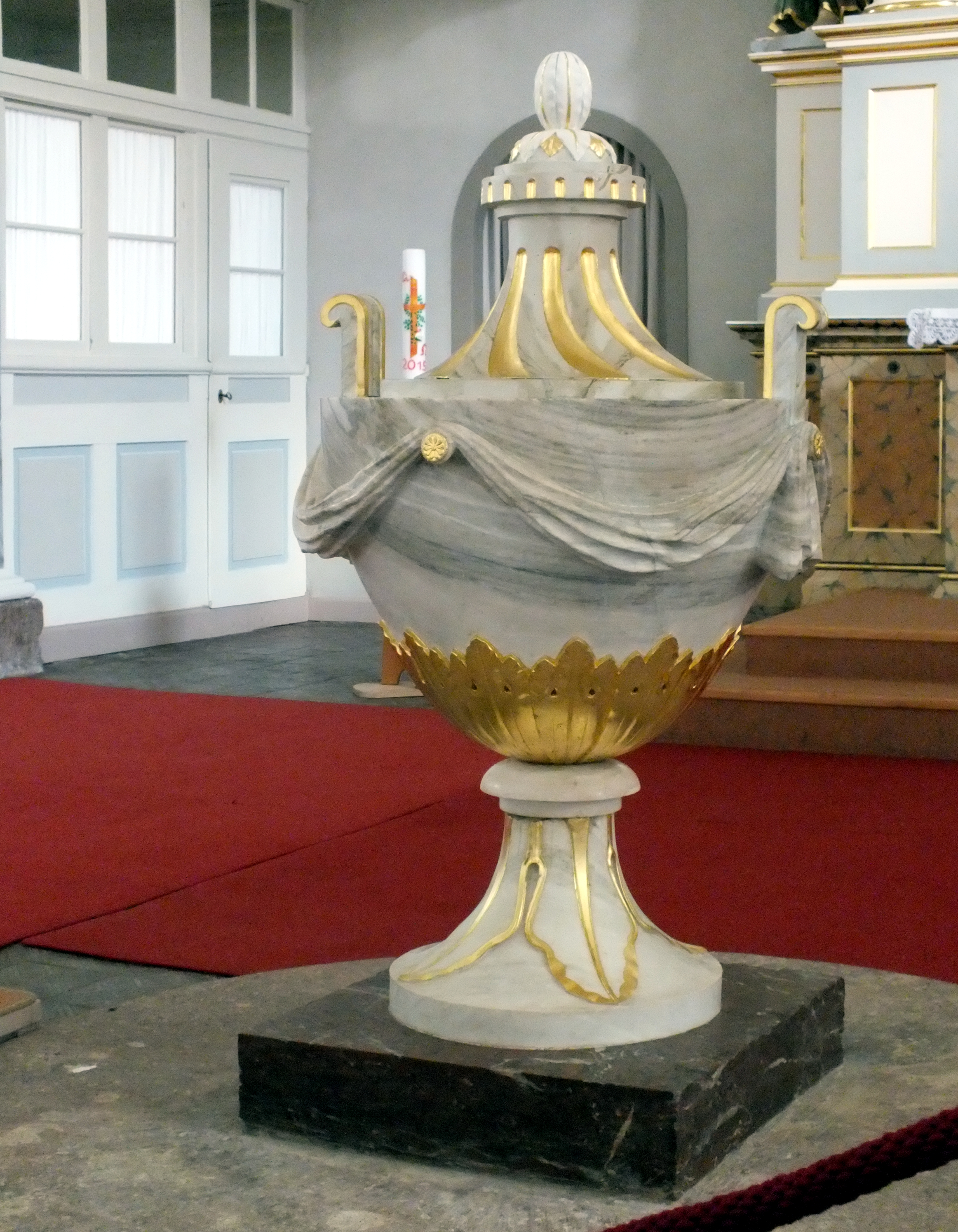 Nicolaikirche Grünhain